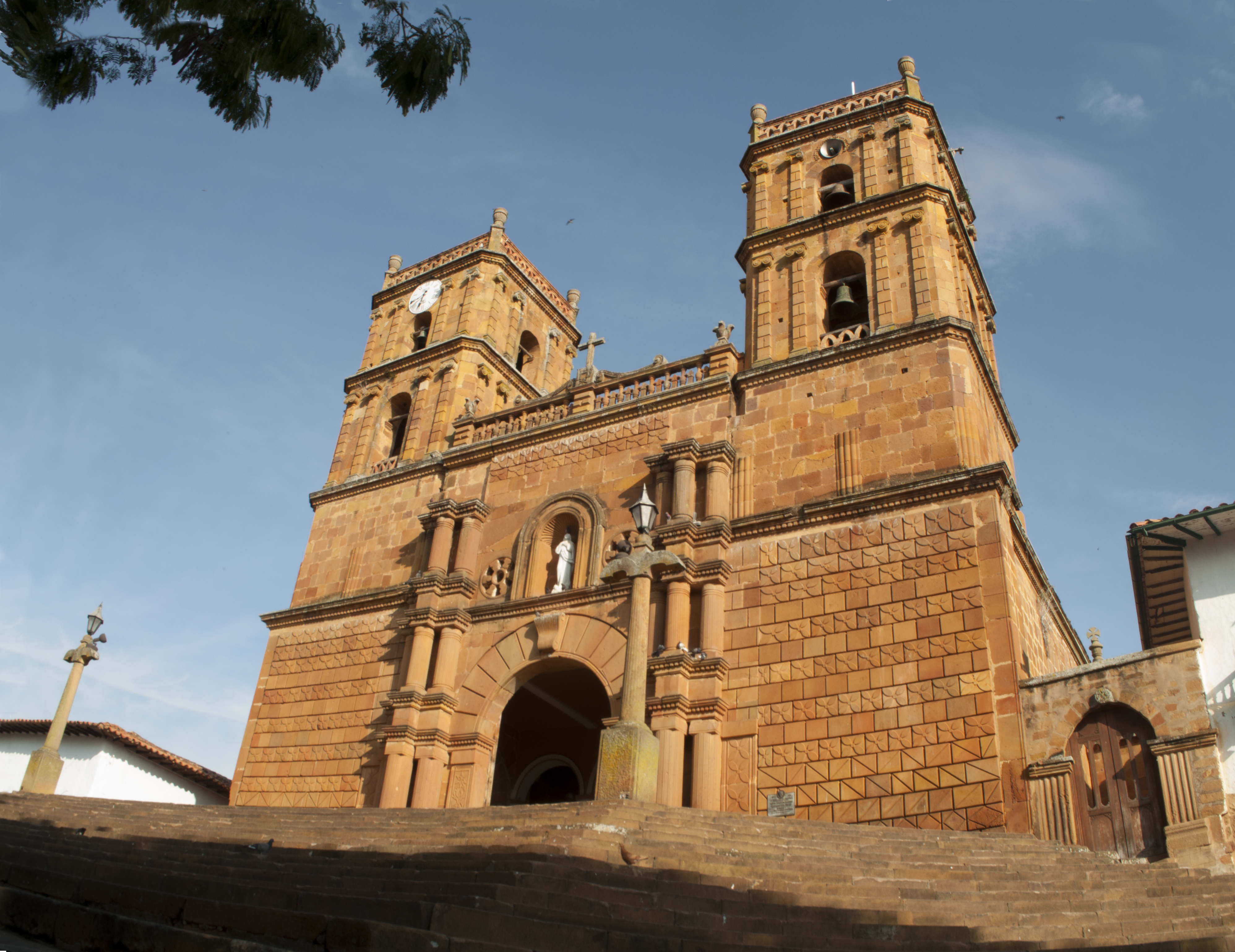 Church of Barichara